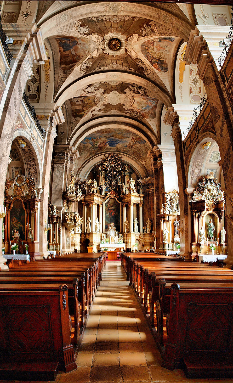 Szent Imre római katolikus ferences templom (Székesfehérvár, Városház tér) This is a photo of a monument in Hungary, Identifier: 3913